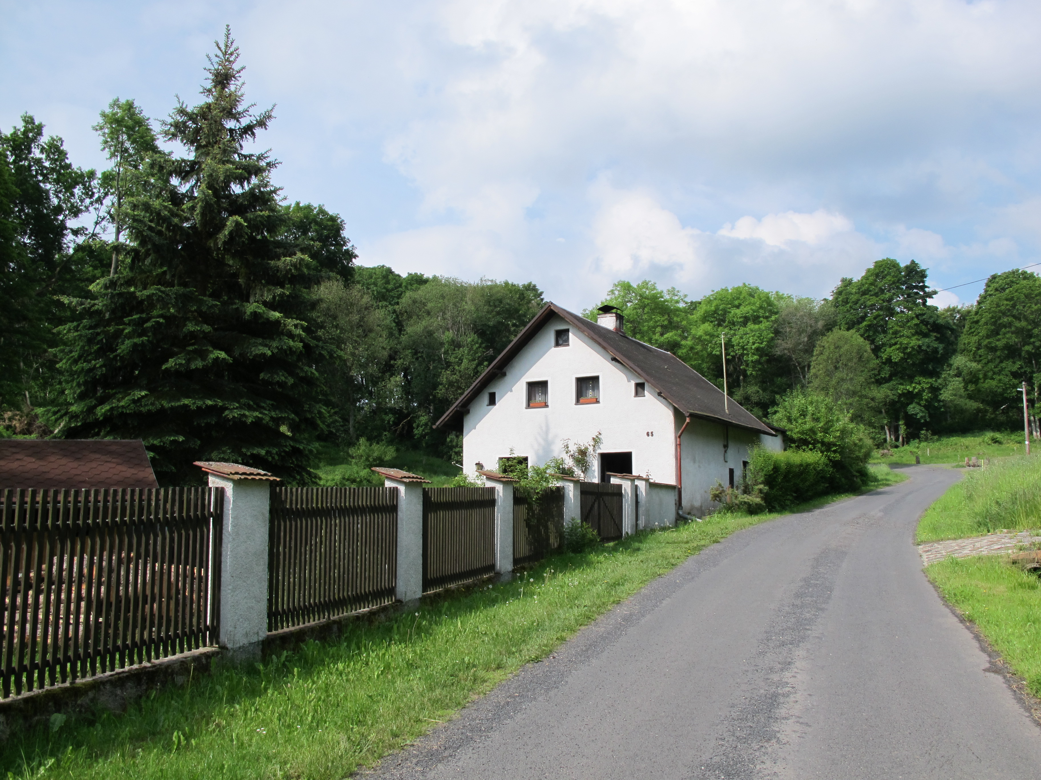 Vysoká, okres Cheb. Průjezdní silnice, č.p. 65. This image was acquired during the event Wikiměsto Mariánské Lázně.